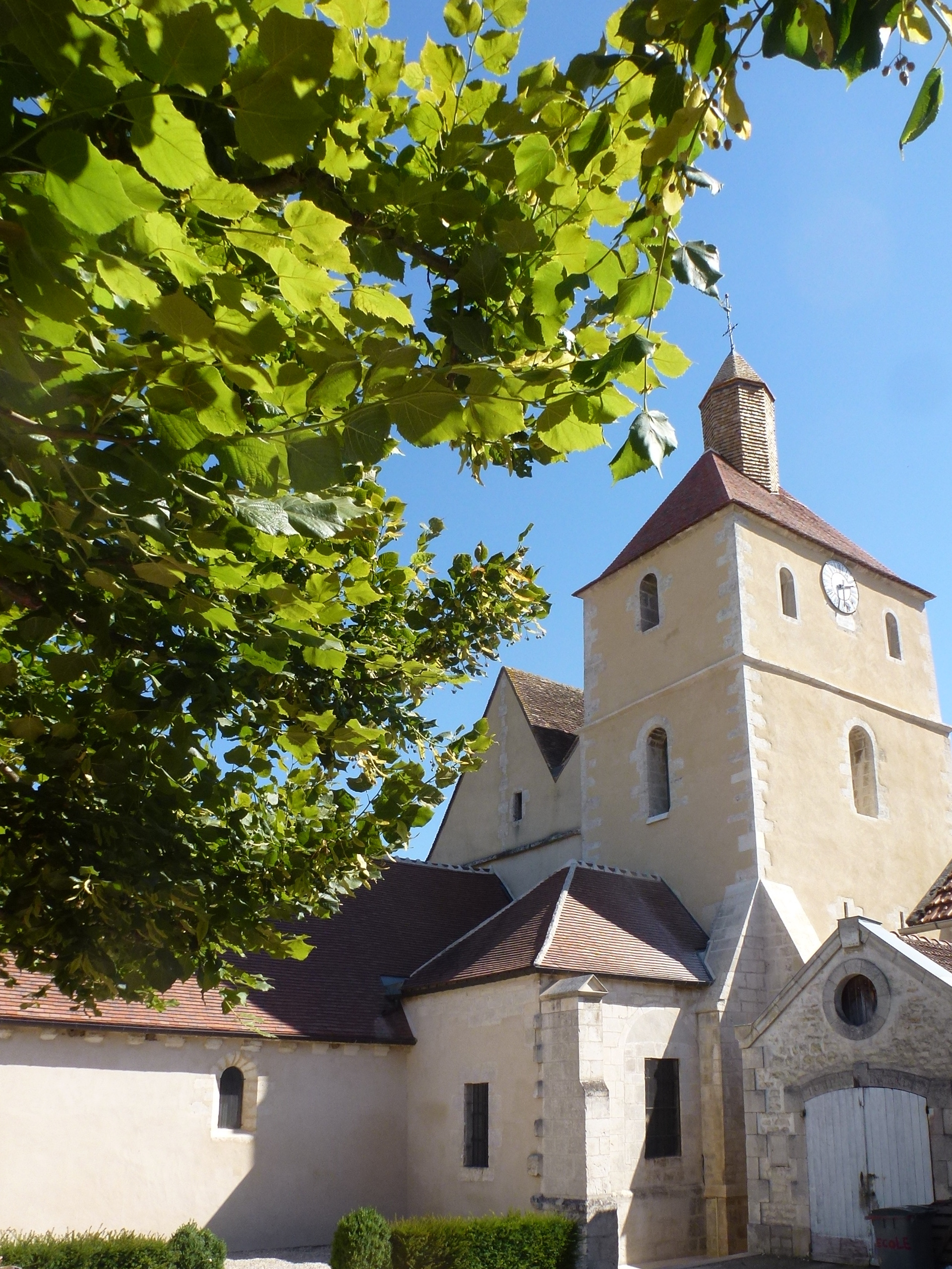 Église de JUSSY Yonne 89290